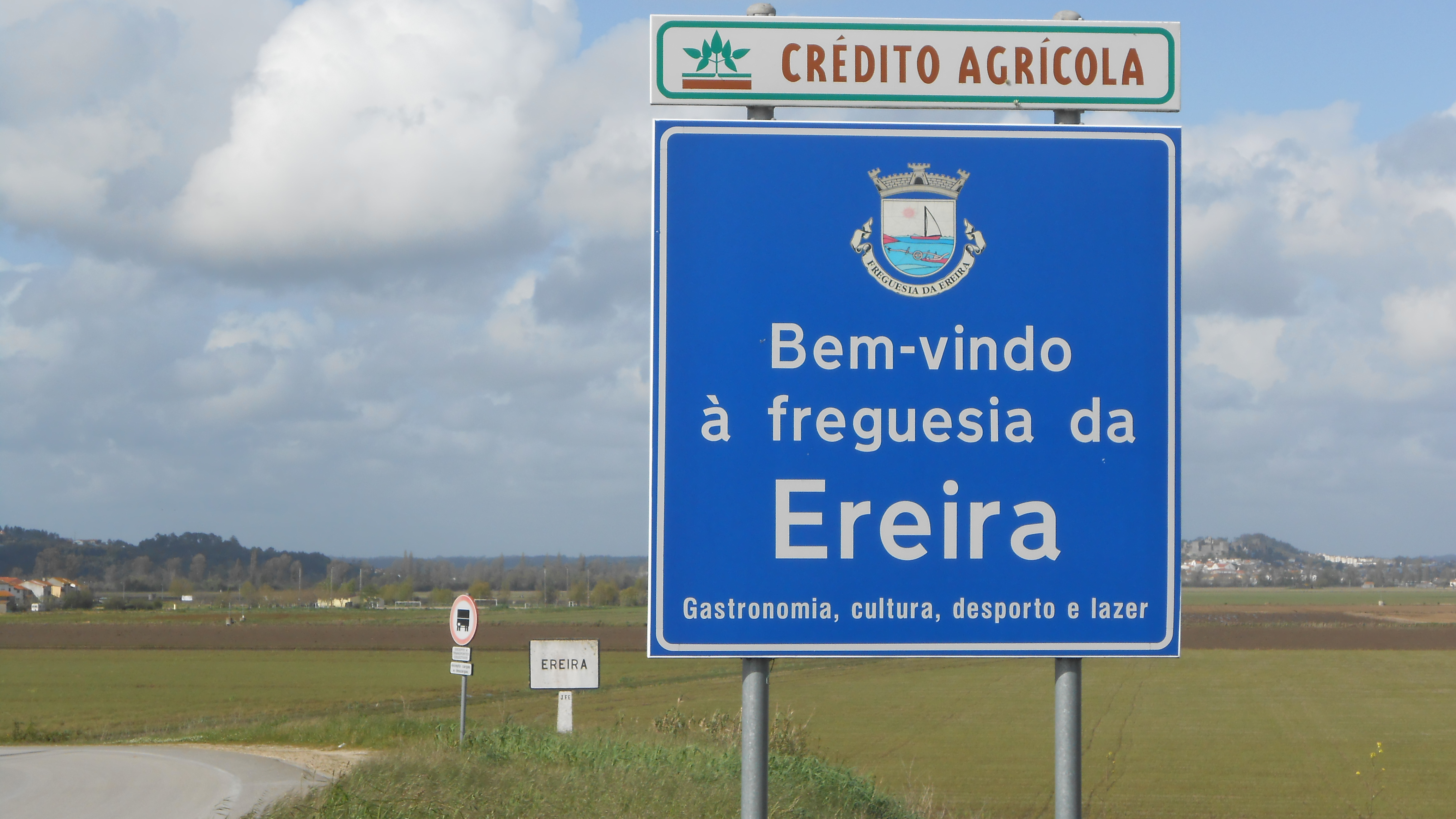 Ortseingangsschild der Gemeinde und des Ortes Ereira (Montemor-o-Velho)